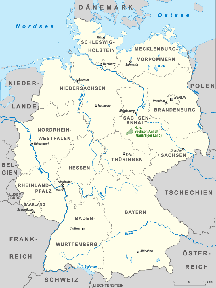 Karte des Naturparks Harz/Sachsen-Anhalt (Mansfelder Land) in Deutschland